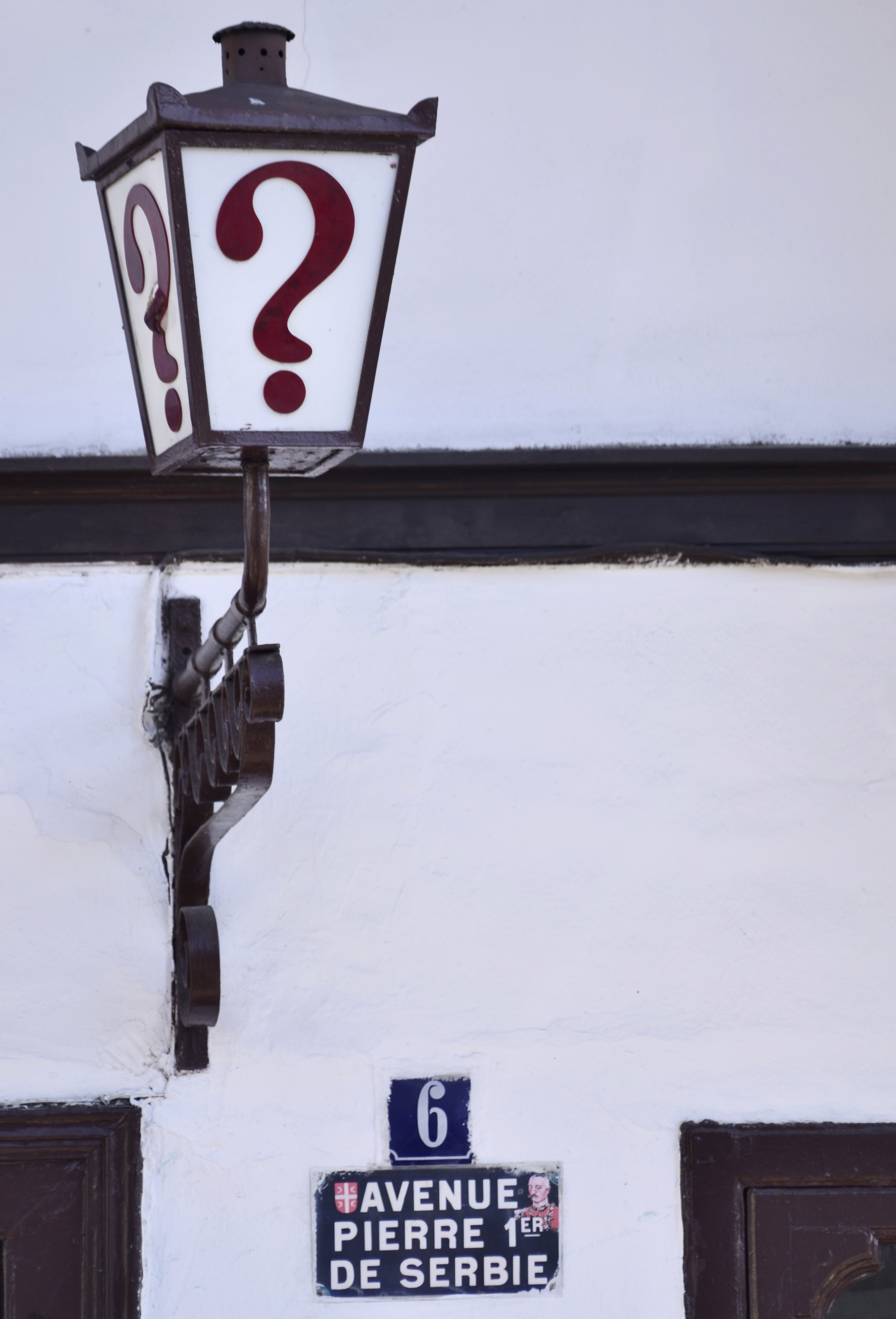 Кафана "?"